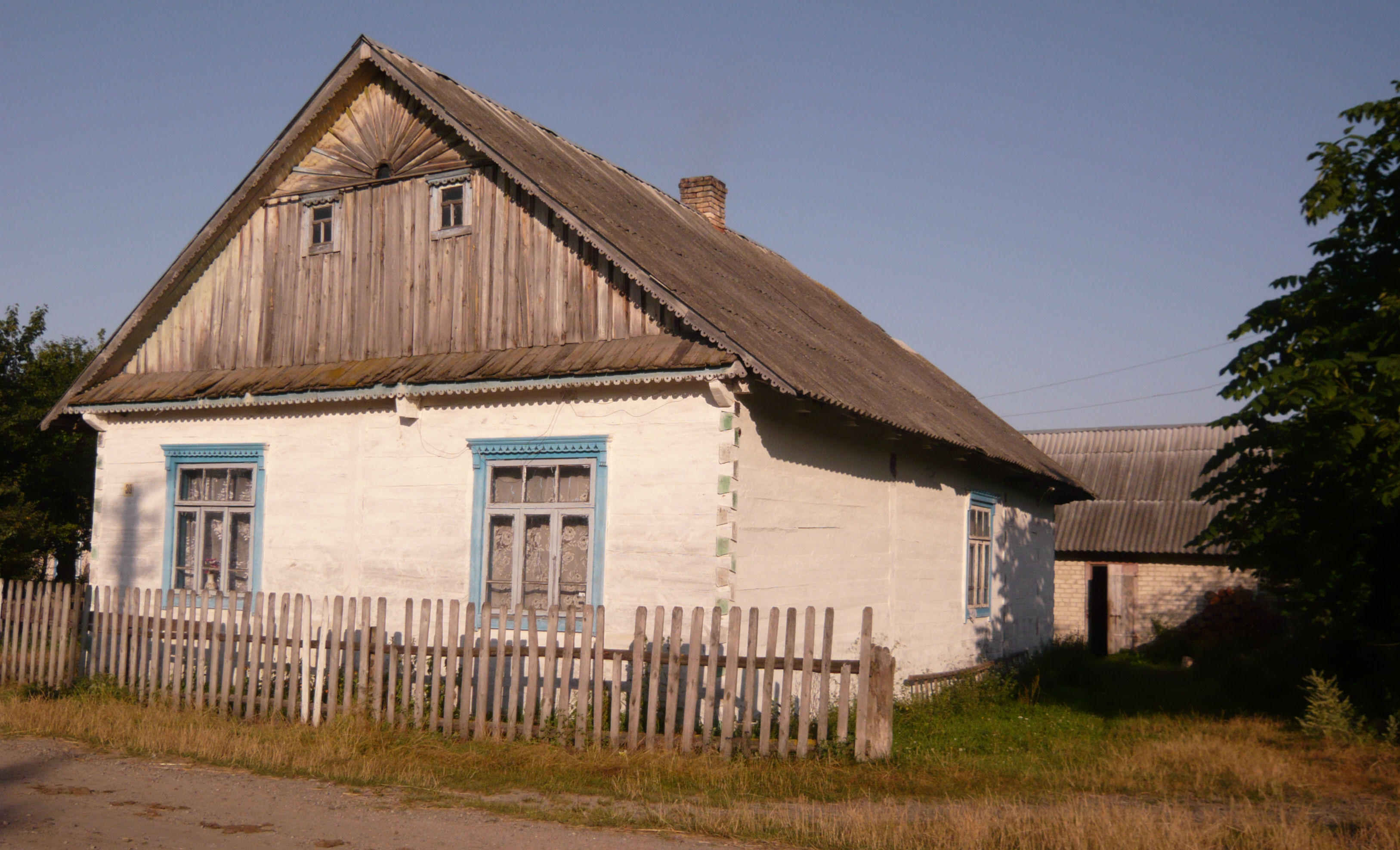 Wołczeck - typowy dom we wsi.